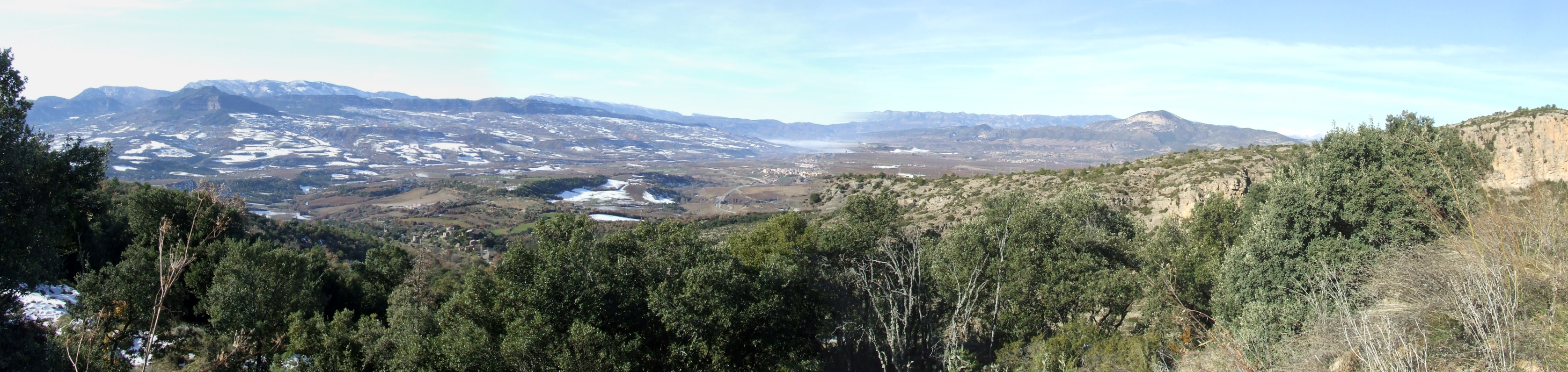 Vista general de la meitat septentrional del terme de Gavet de la Conca (Pallars Jussà)